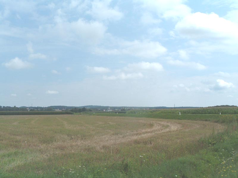 Rábakeresztúri táj (Burgenland, Ausztria)